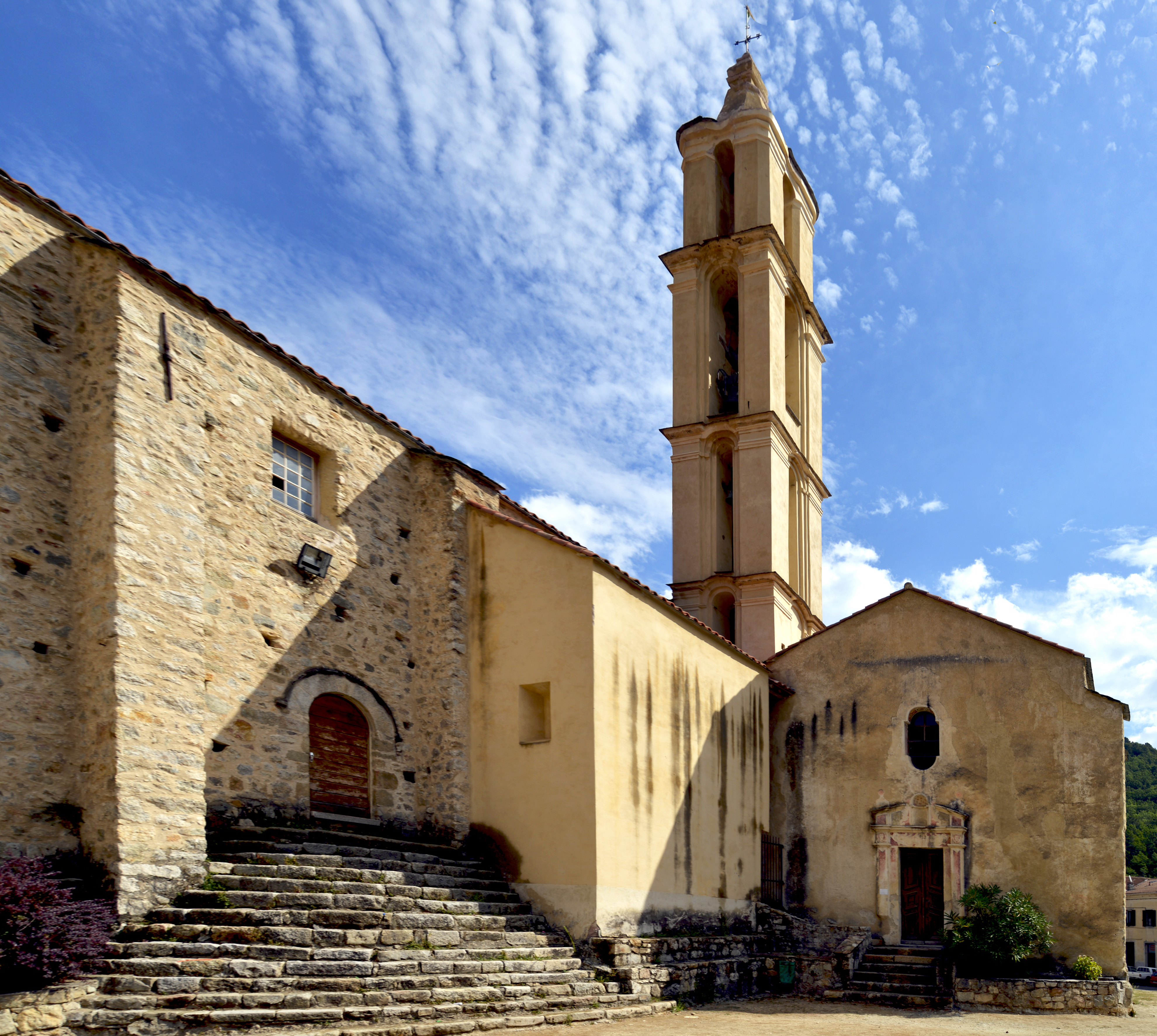 Ghisoni, Fiumorbo (Haute-Corse) - Église Santa Maria, ancienne paroisse.